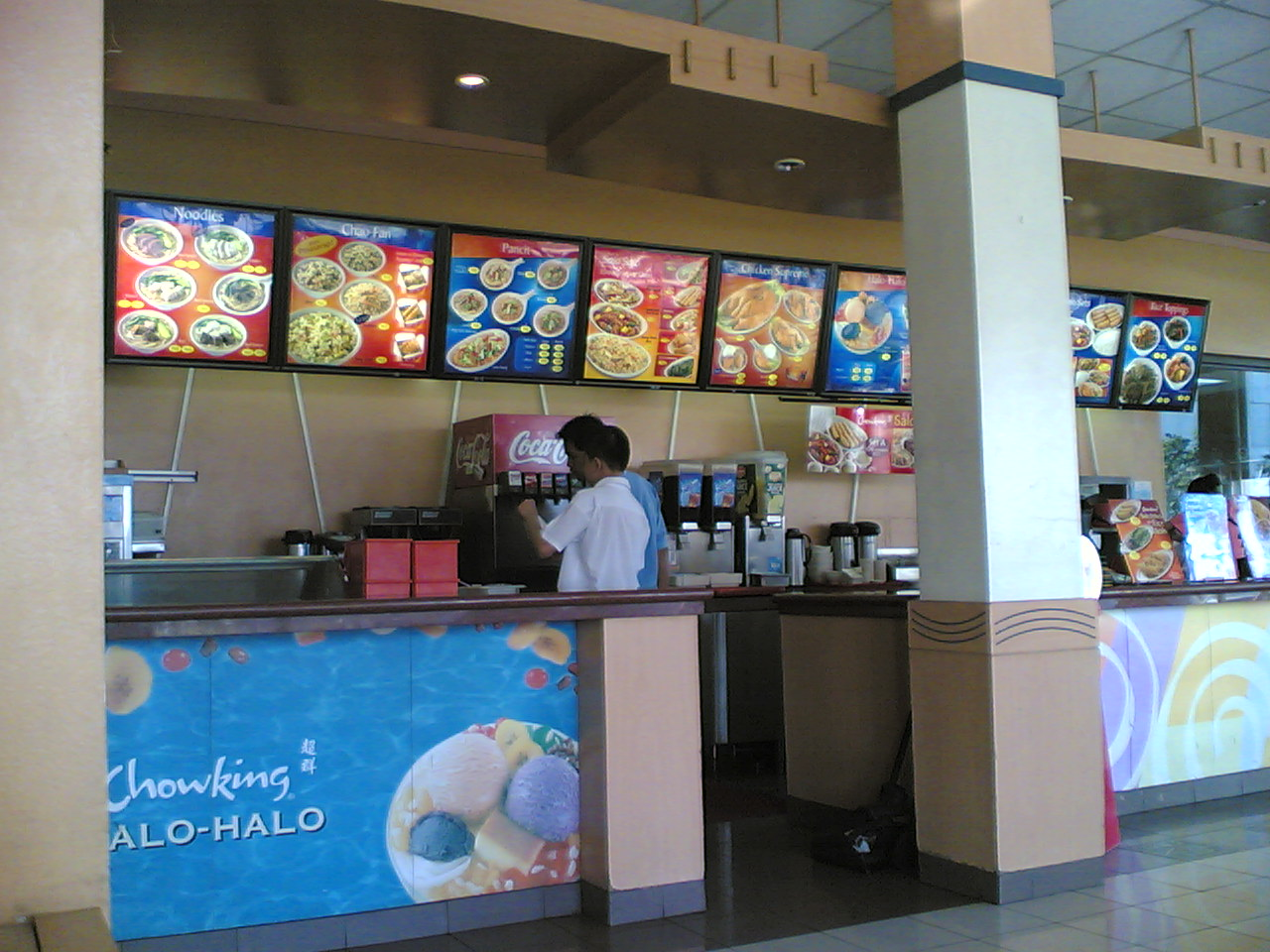 Tagalog: Chowking sa Stopover, Fort Bonifacio, Taguig